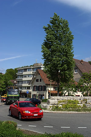 Kreisel in Bottmingen